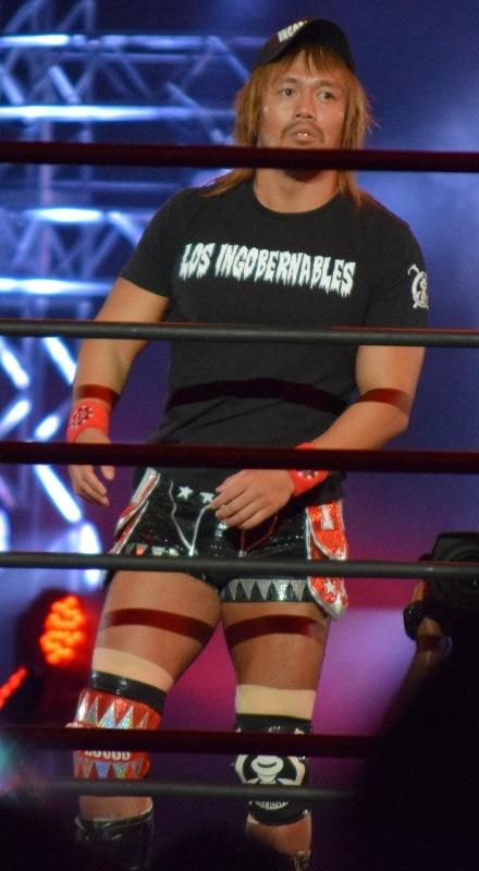 2015年8月1日 大阪府立体育会館 「G1 CLIMAX 25」 内藤哲也